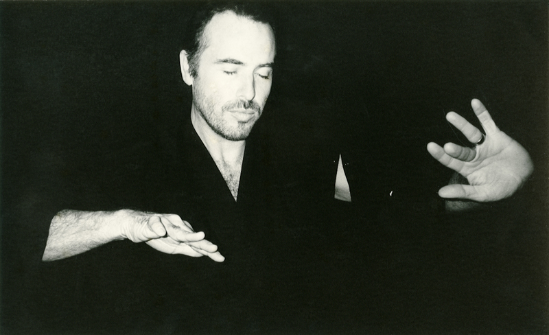 TRANSPARADOX: Transparadoxales-perceptions. Pratique des éducatifs du Kata-Sarbacana (Zen-Dojo-Sarbacana, Michel-Laurent Dioptaz (Chanteloup 1985)